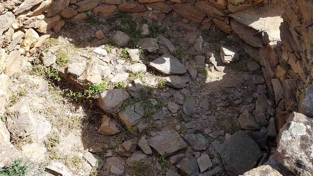 Nuraghe San Pietro